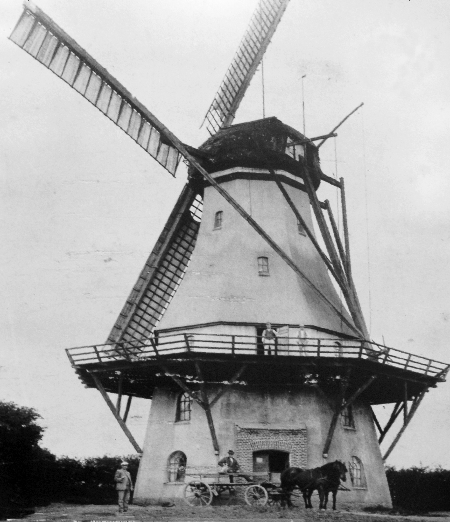 Mühle Aurora von Unewatt, links der Erbauer Hans W. Callsen